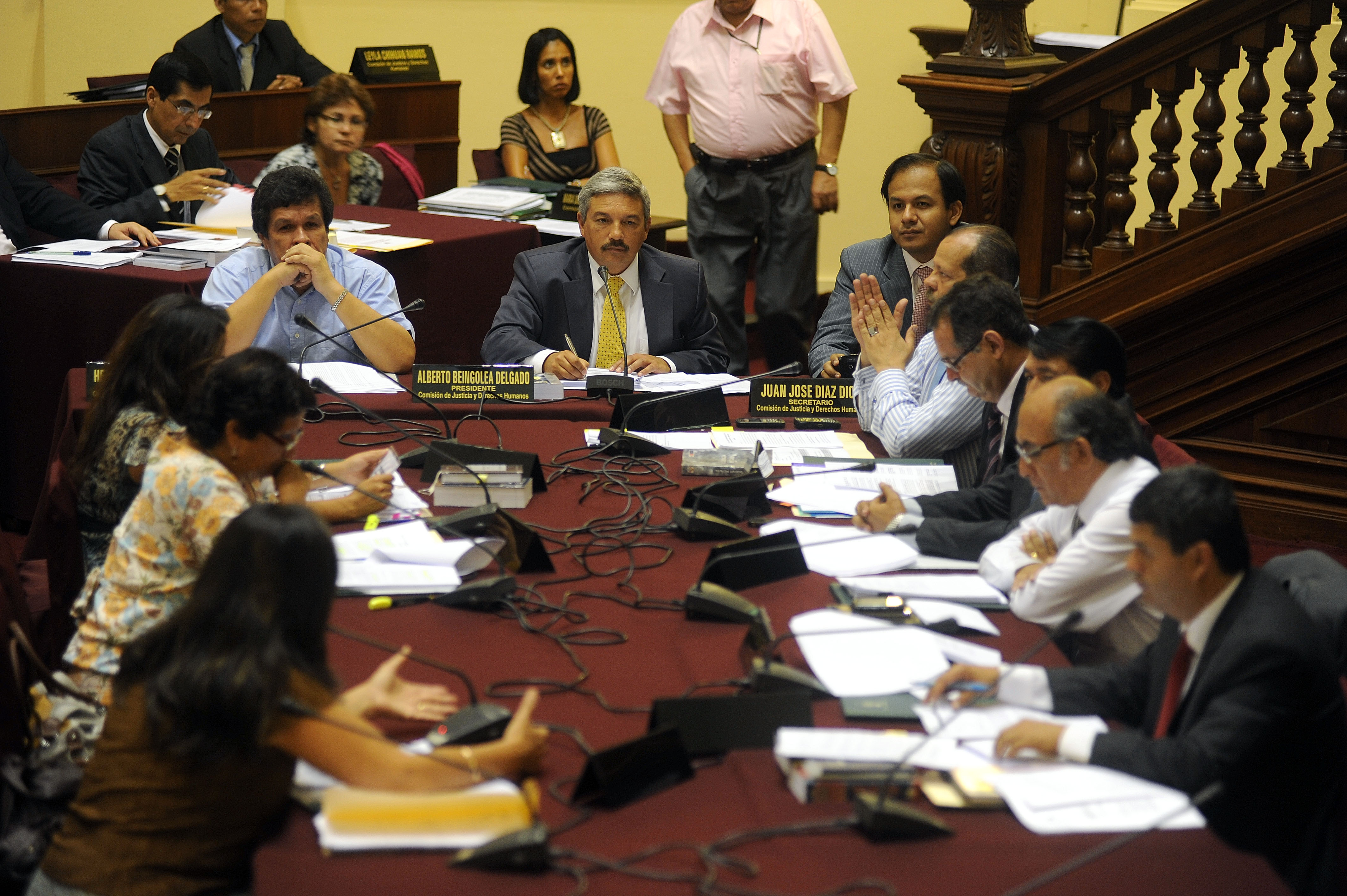 En sesión de la Comisión de Justicia, presidida por el congresista Alberto Beingolea Delgado, se abordó el caso del traslado del interno Antauro Humala Tasso, del penal de Piedras Gordas, de Ancón, al María de las Mercedes, de Chorrillos. Se convino en citar a una próxima sesión al ministro de Justicia y al jefe del INPE.